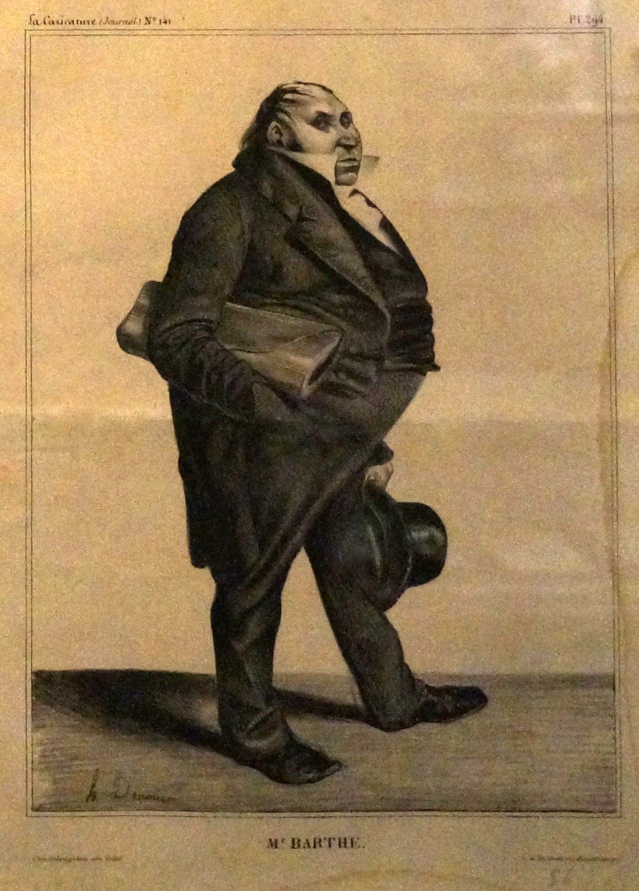 présenté au Musée de la Franc-Maçonnerie.